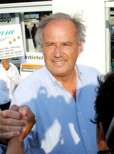 Barnechea en su visita a Ica